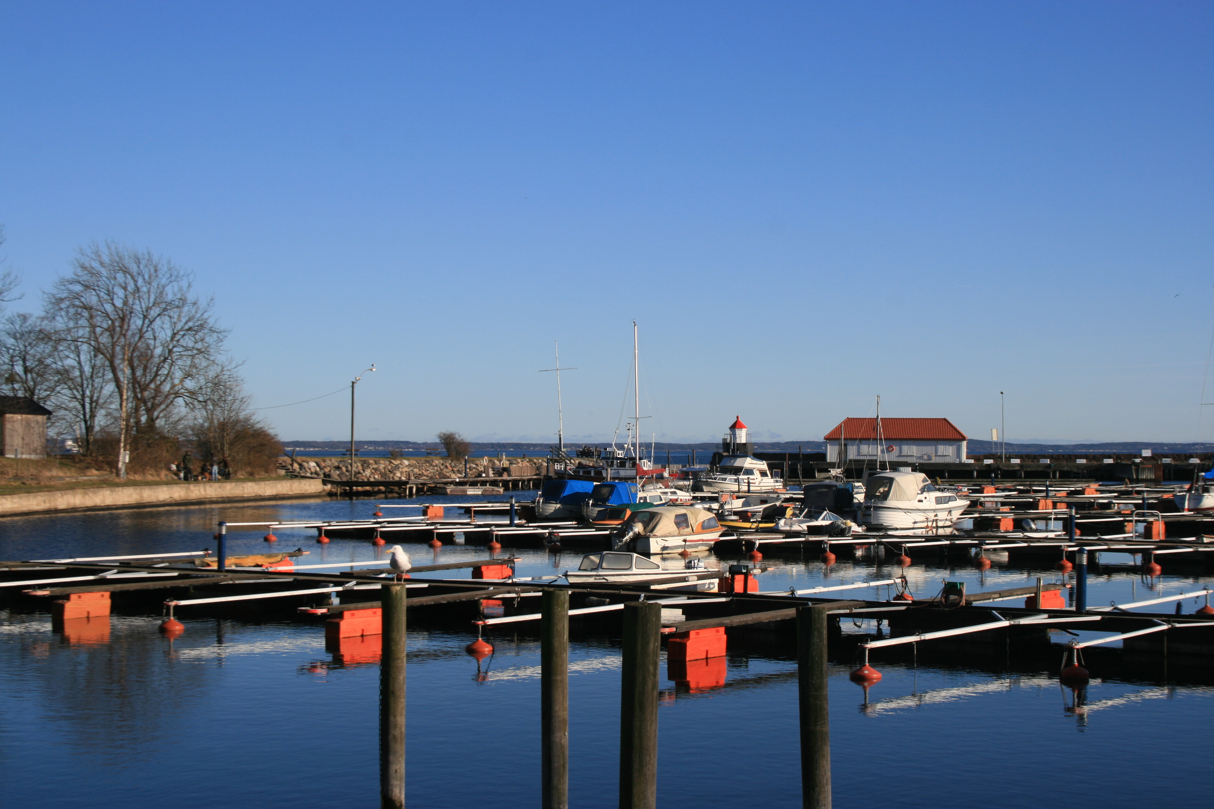 Fyllinga småbåthavn, i tilgrensning til Hortenstangen.